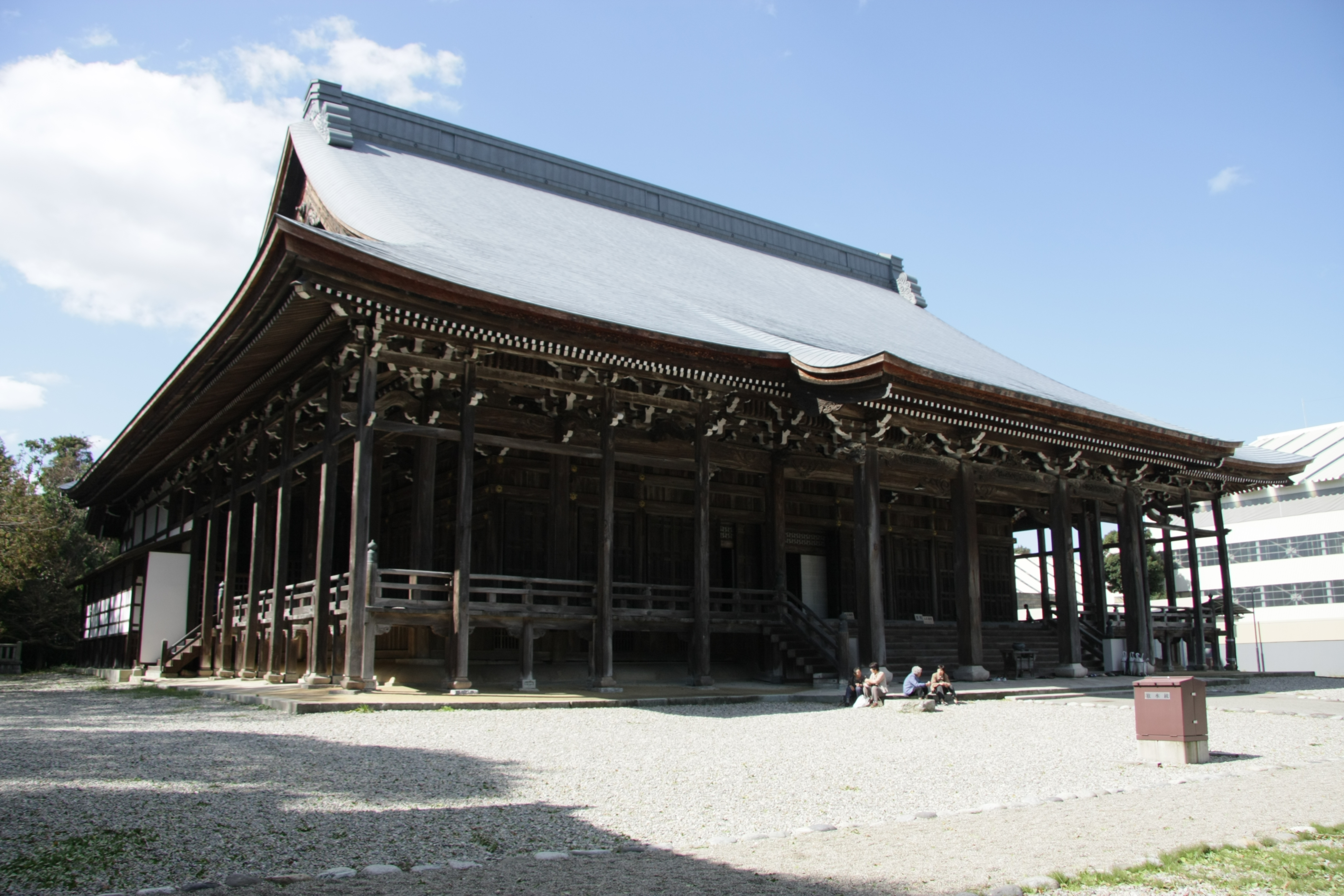 勝興寺の本堂